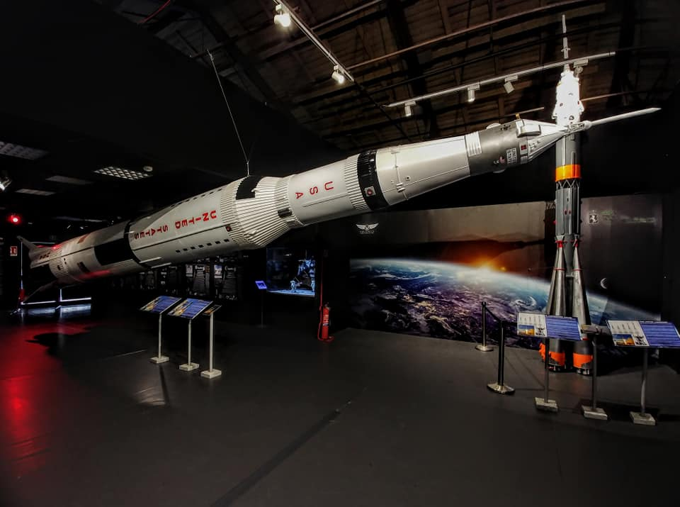 riproduzioni del saturno v e della soyuz a Volandia